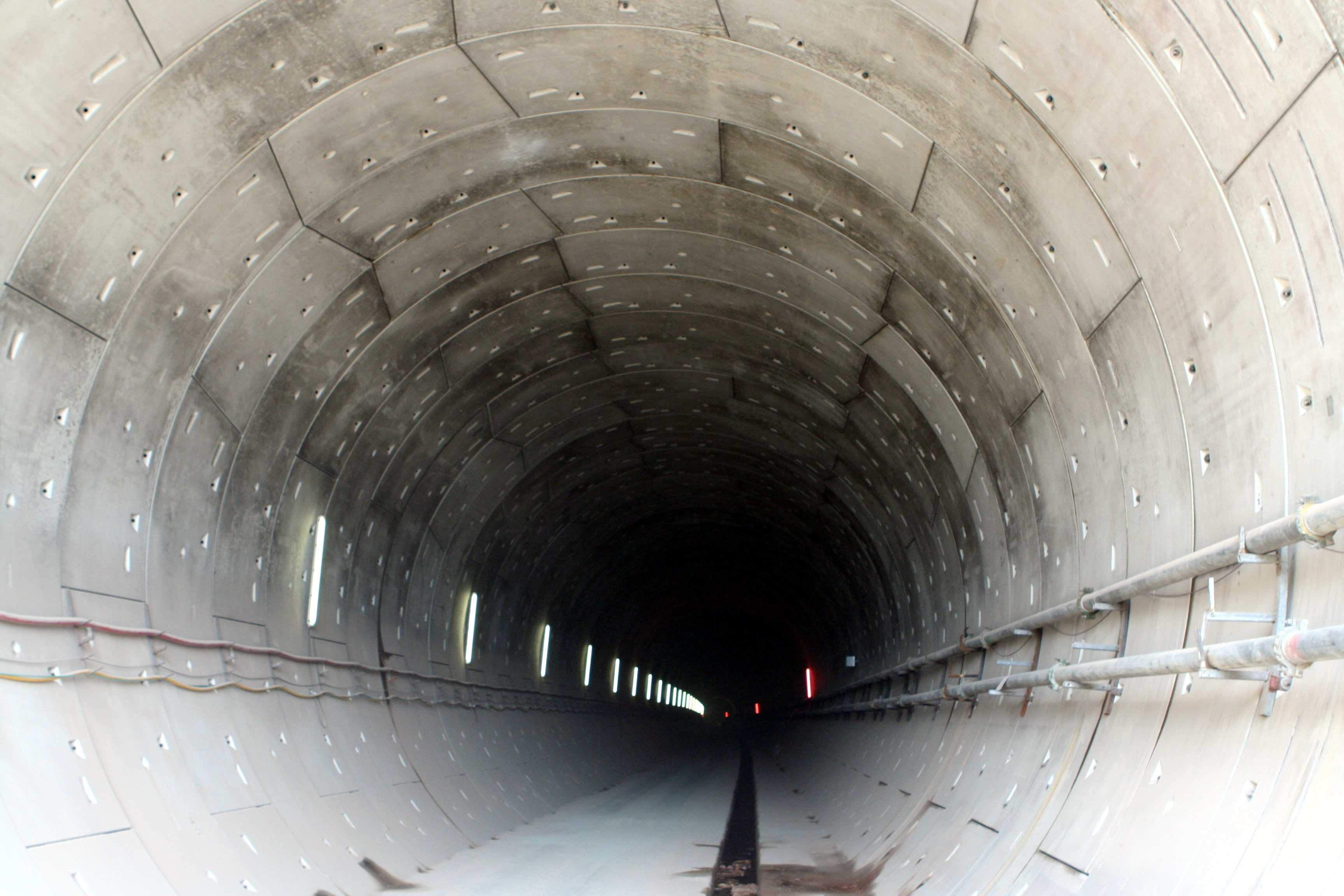 Finnetunnel